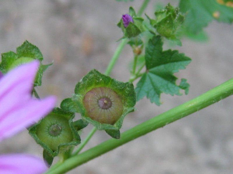 Frucht der Wilden Malve Malva sylvestris